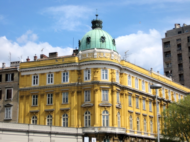 Palača Ploech, Rijeka